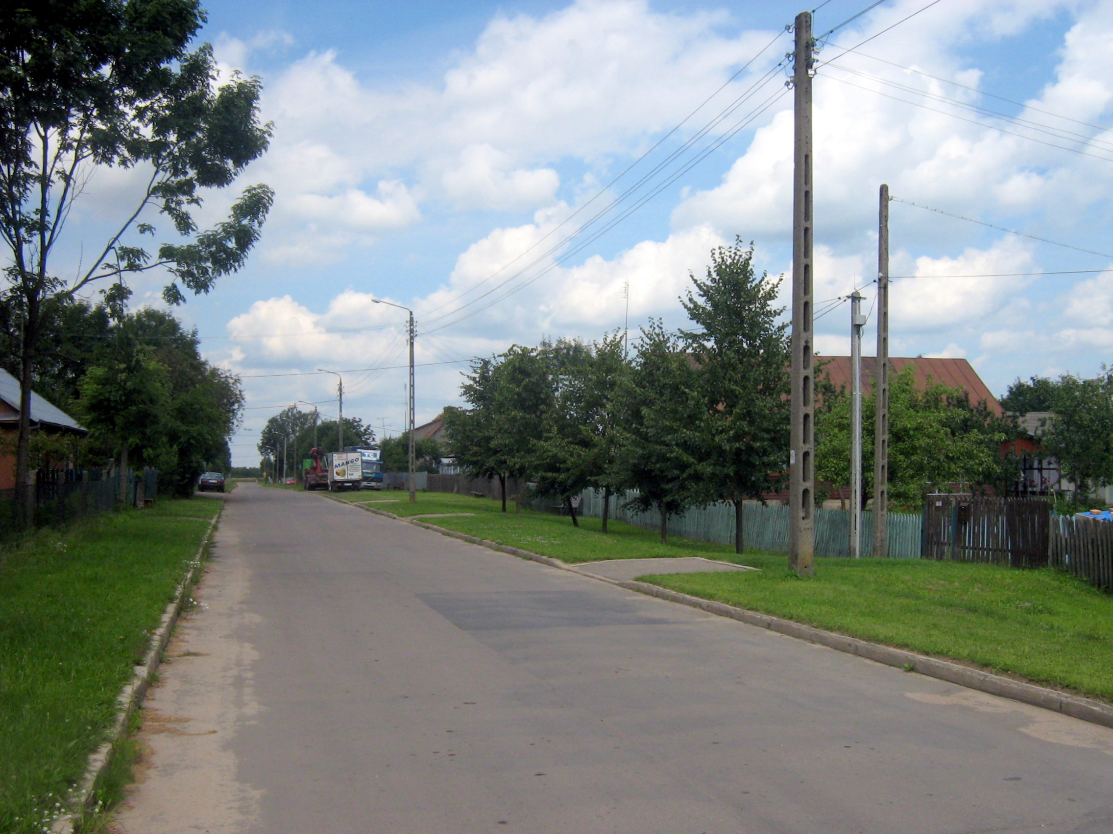 Droga w Bielszczyźnie.